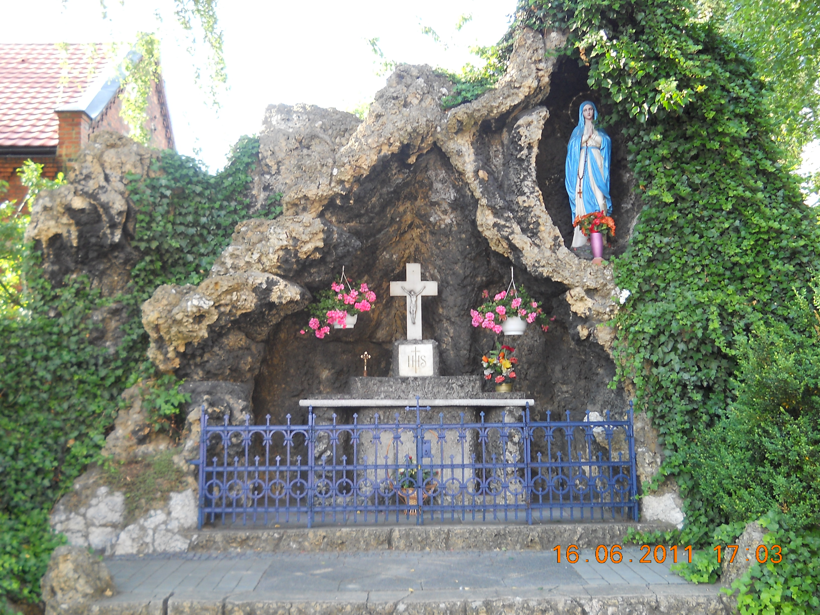 kościół par. p.w. św. Mikołaja Pyskowice, ul. Poniatowskiego